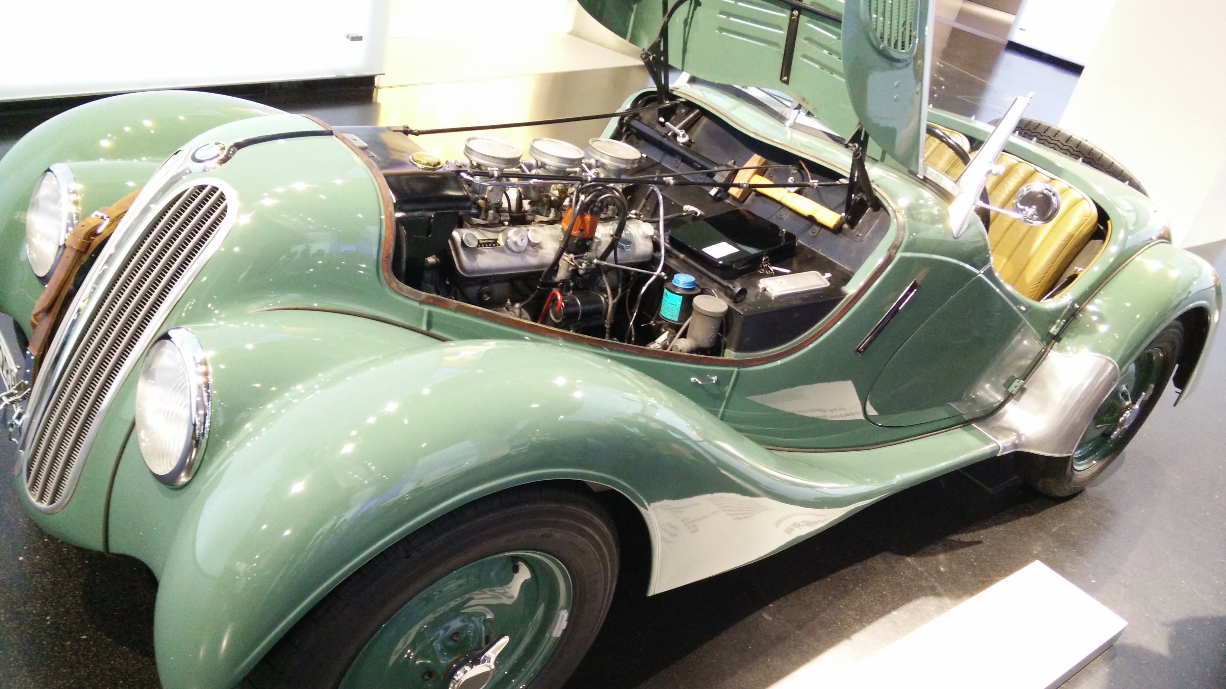 IMG_20141113_120638